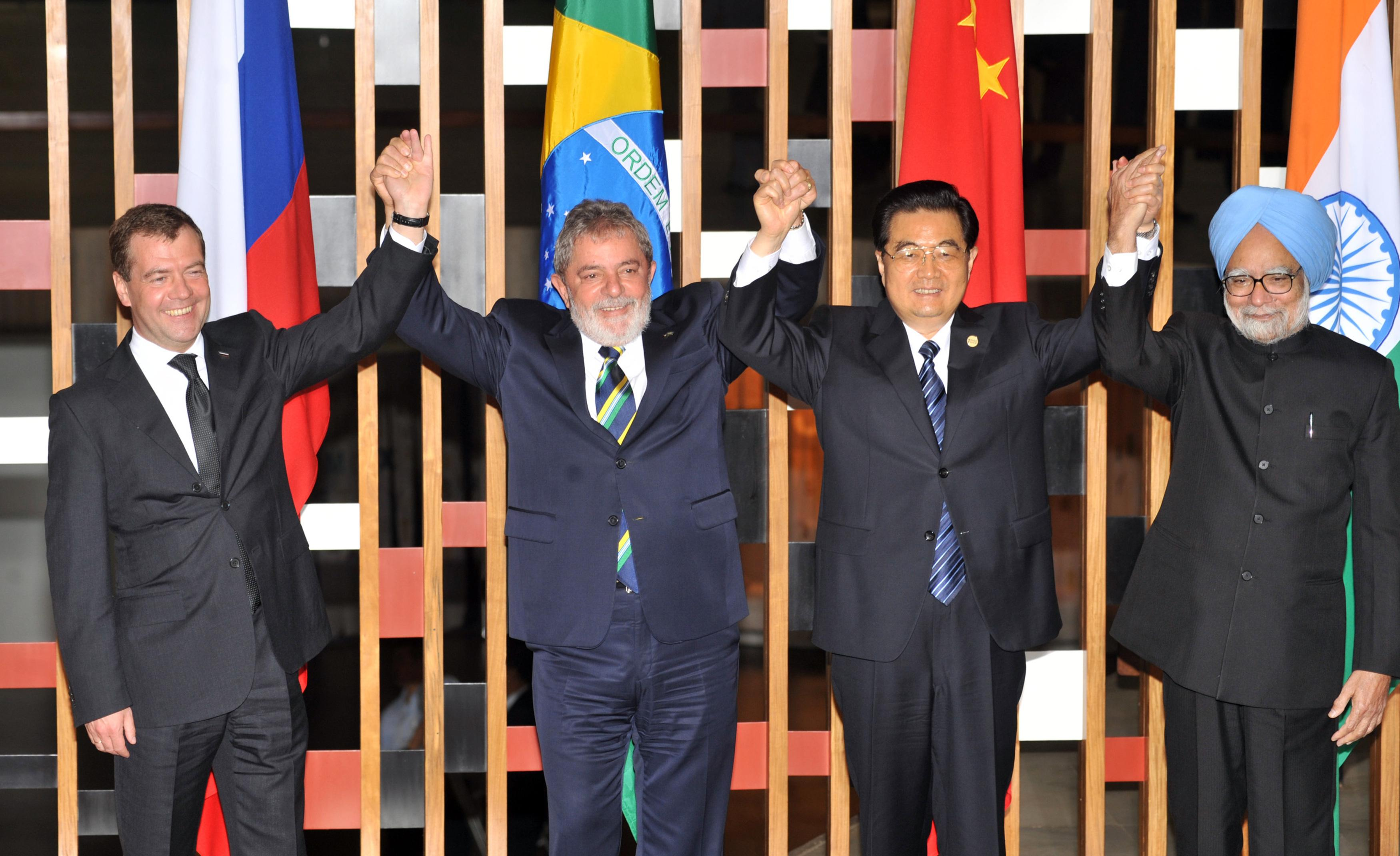 Brasília - O presidente da Rússia, Dmitri Medvedev, o presidente Lula, o presidente da China, Hu Jintao, e o primeiro-ministro da Índia, Manmohan Singh, posam para a foto oficial durante a 2ª Cúpula de Chefes de Estado e de Governo do BRIC (José Cruz/ABr)